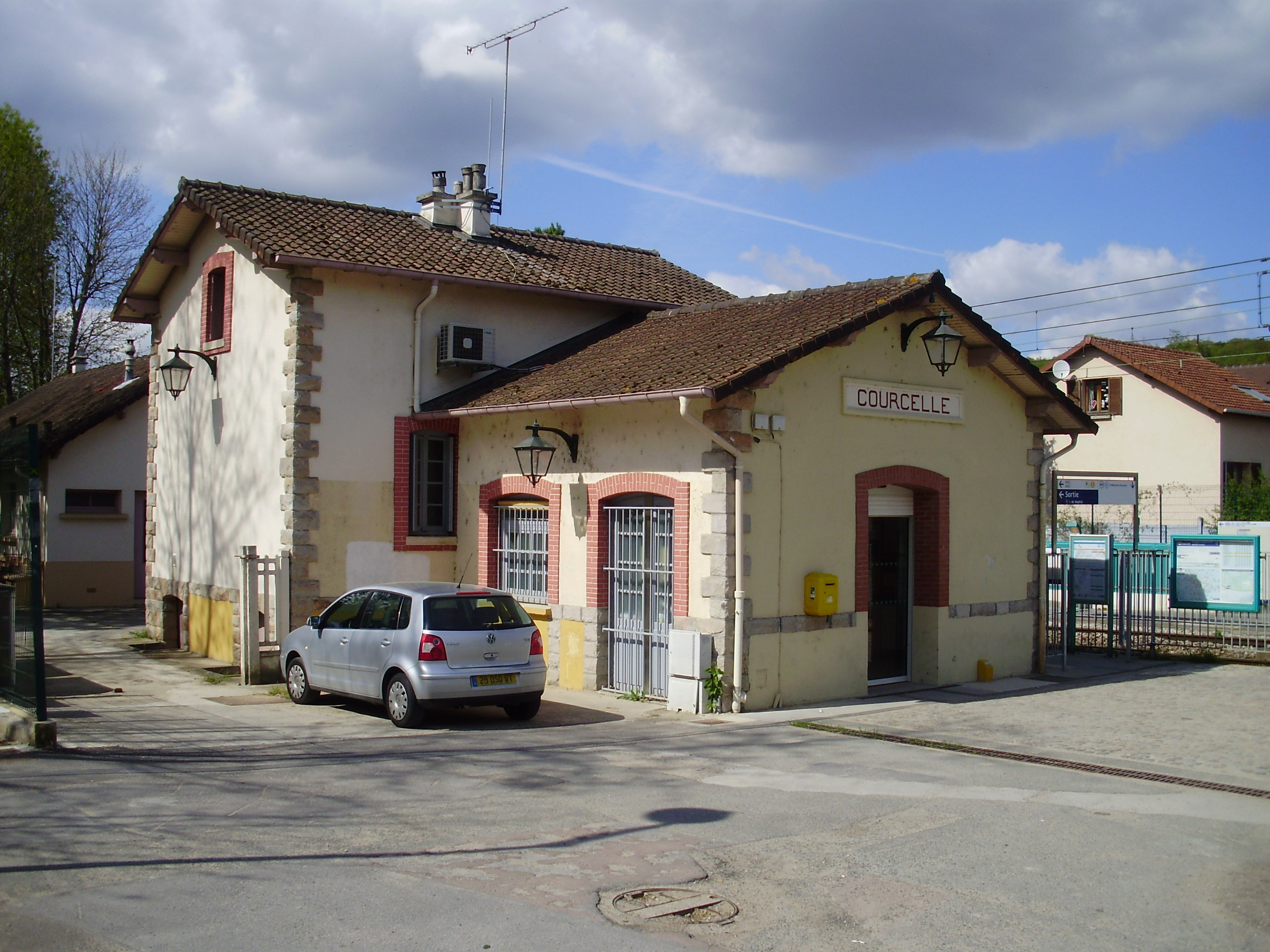 Gare de Courcelle-sur-Yvette, à Gif-sur-Yvette, Essonne, France (bâtiment voyageurs)